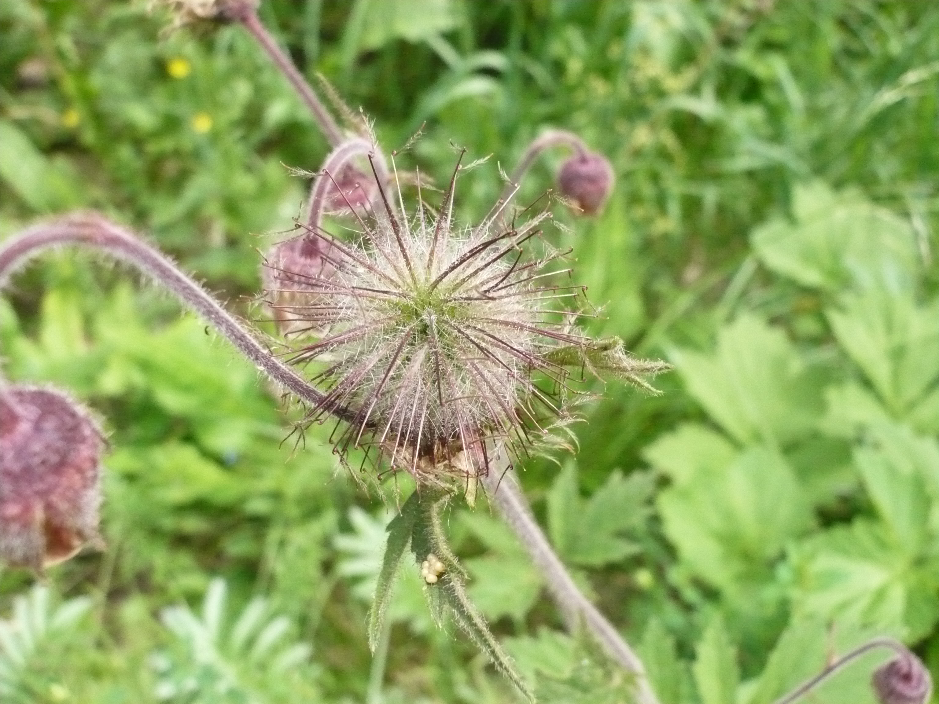 Гравилат речной. Окрестности Пензы, Россия